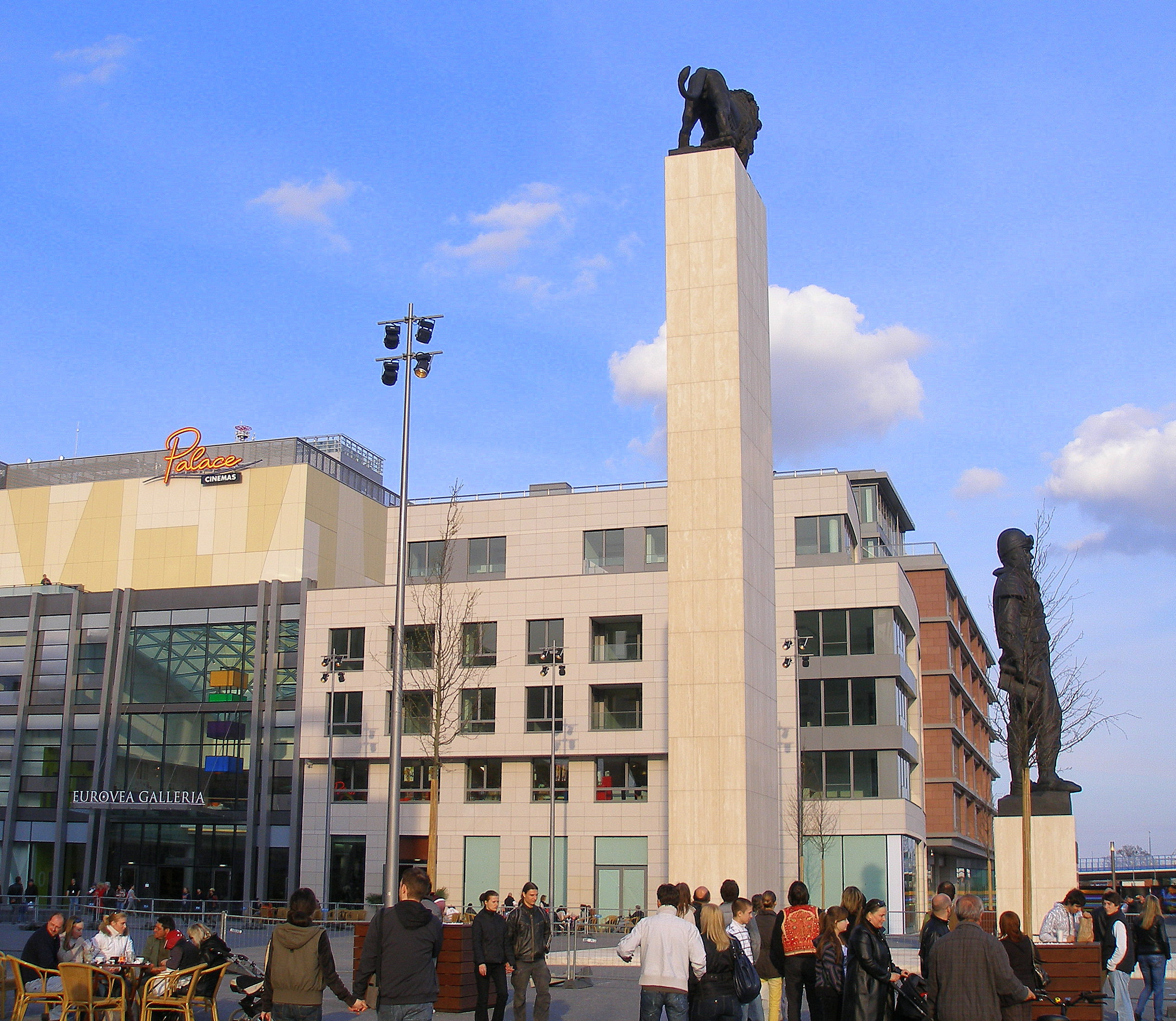 Bratislava. Nová bratislavská štvrť Eurovea.Socha generála Milana Rastislava Štefánika, stojí od roku 2009 pred novou budovou Slovenského národného divadla v Bratislave. Bronzová plastika generála Milana Rastislava Štefánika je 7,4 m vysoká a slávnostne bola odhalená 4. mája 2009. Socha stojí na 5 metrovom podstavci . Jej autorom je český sochár Bohumil Kafka. Bratislava, Slovensko.